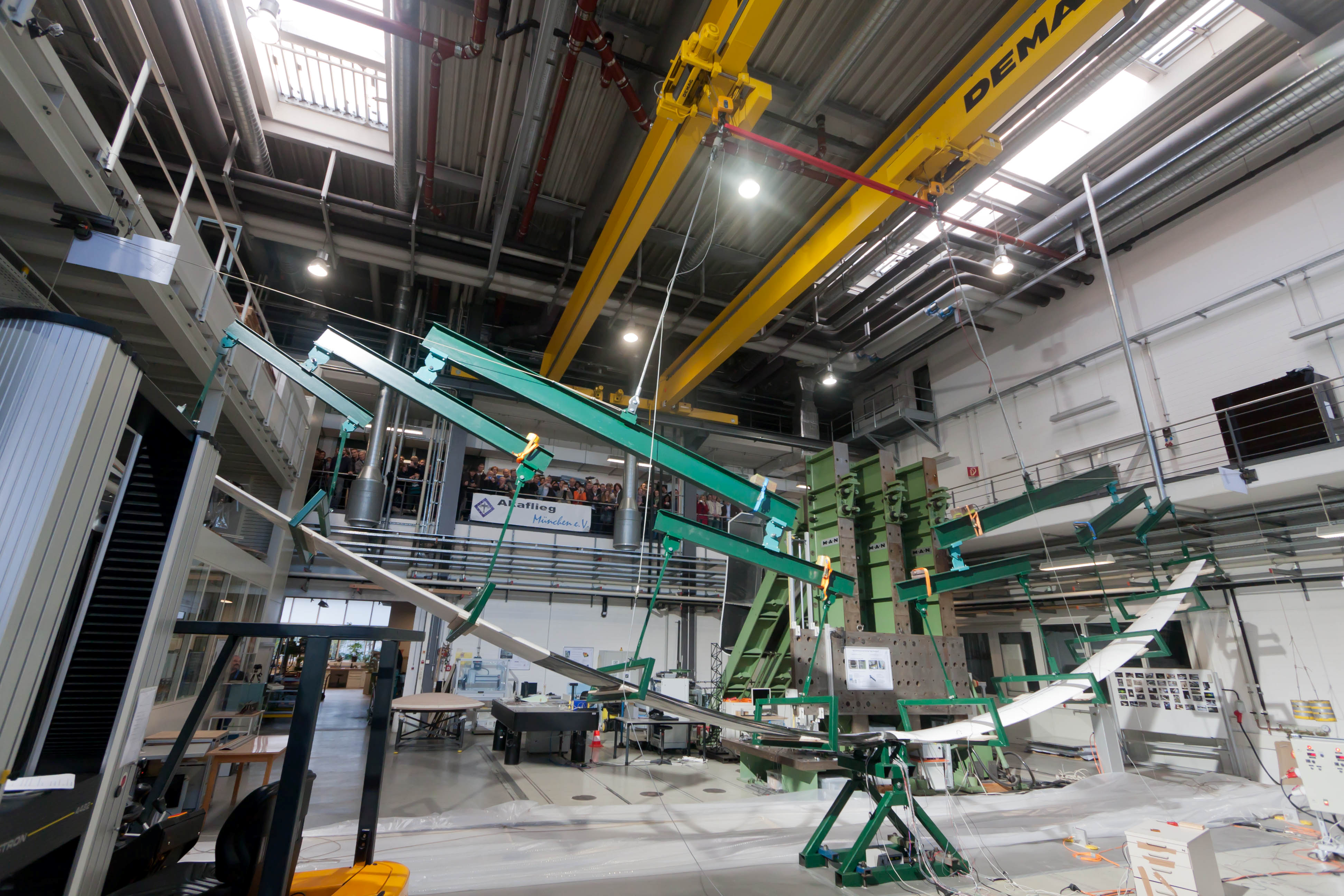 Bruchversuch des Akaflieg Mü 31 Flügels kurz vor dem Bruch.